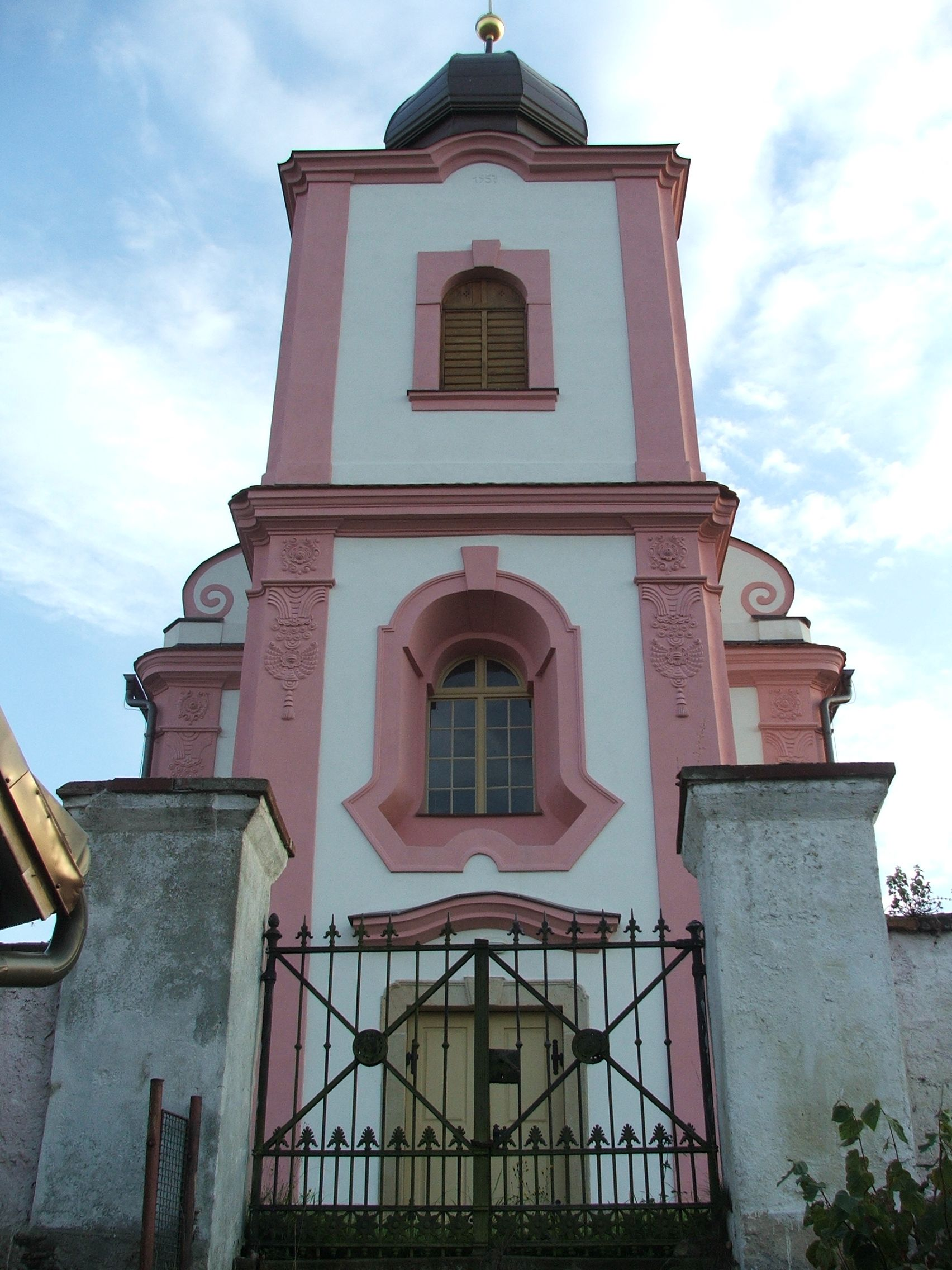 Kostel svatého Jiljí, Krašovice (okres Plzeň-sever).